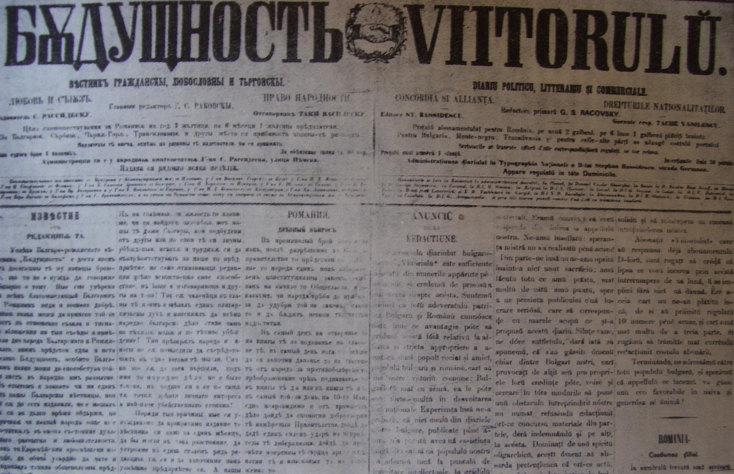 Брой 10 и последен на вестник Бъдущност.